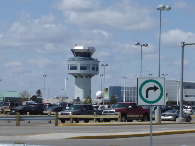 Saskatoon John G. Diefenbaker International Airport